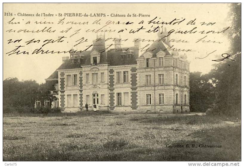 Ancienne carte postale du château de Saint-Pierre de Lamps dans l'Indre